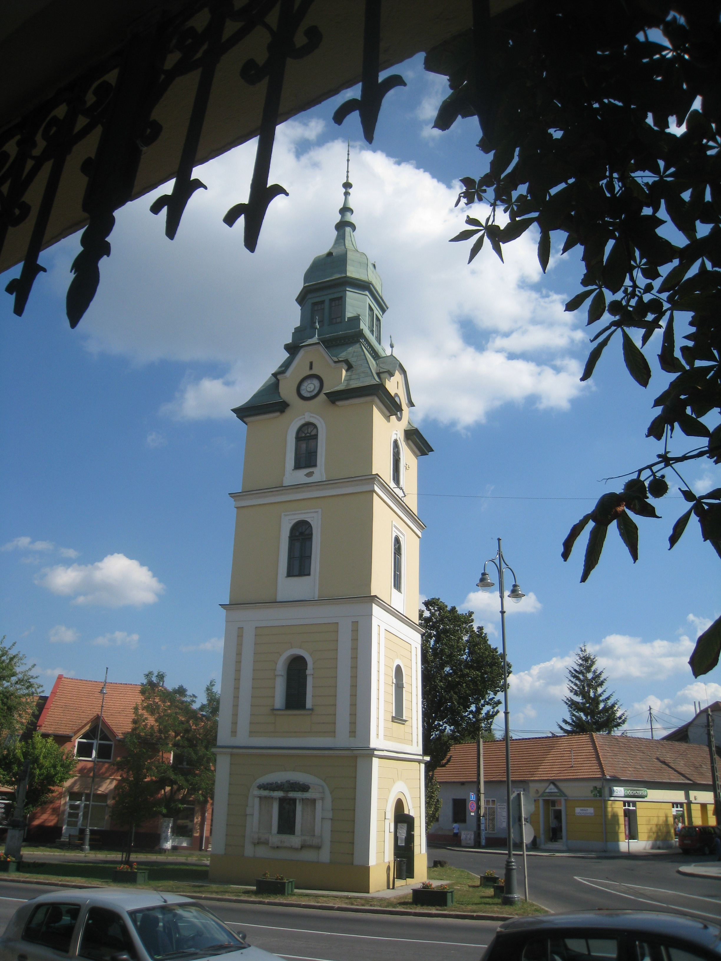 Szécsényi tűztorony (Rákóczi út) This is a photo of a monument in Hungary. Identifier: 6601